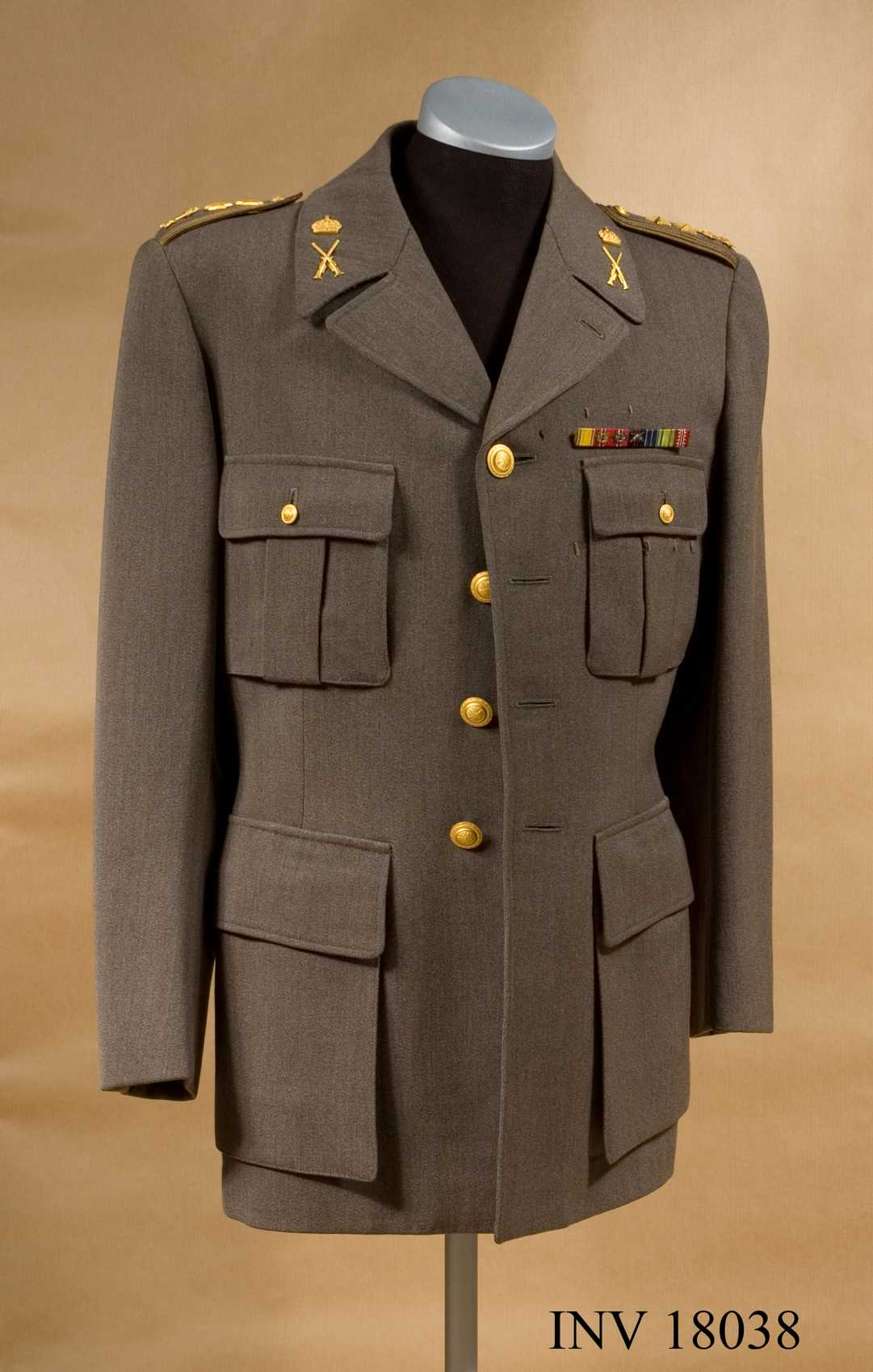 Vapenrock m/1952 Identifikationsnr: AM.018038 Samling: Armémuseum